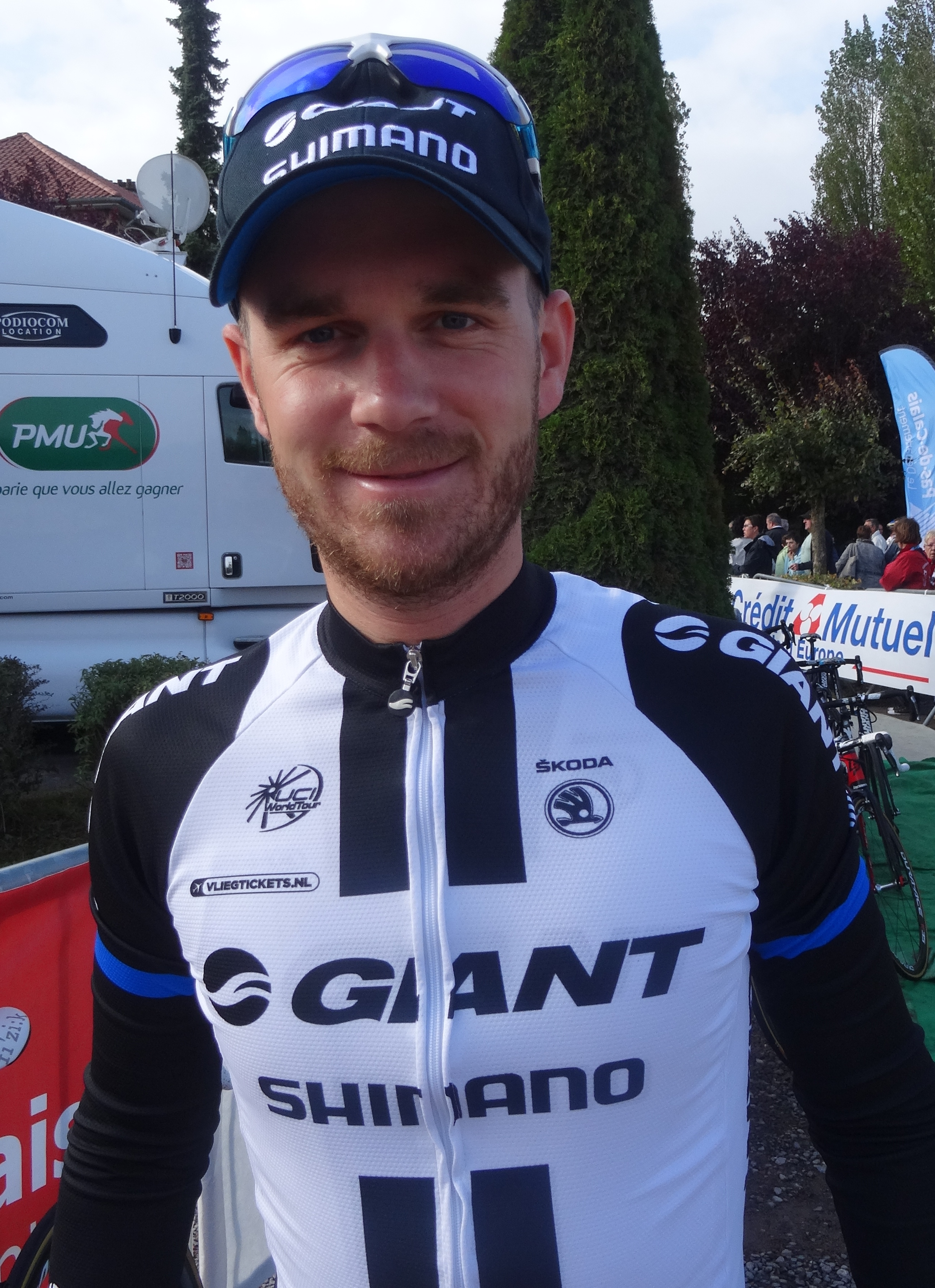 Reportage réalisé le dimanche 21 septembre à l'occasion du départ et de l'arrivée du Grand Prix d'Isbergues 2014 à Isbergues, Nord-Pas-de-Calais, France.